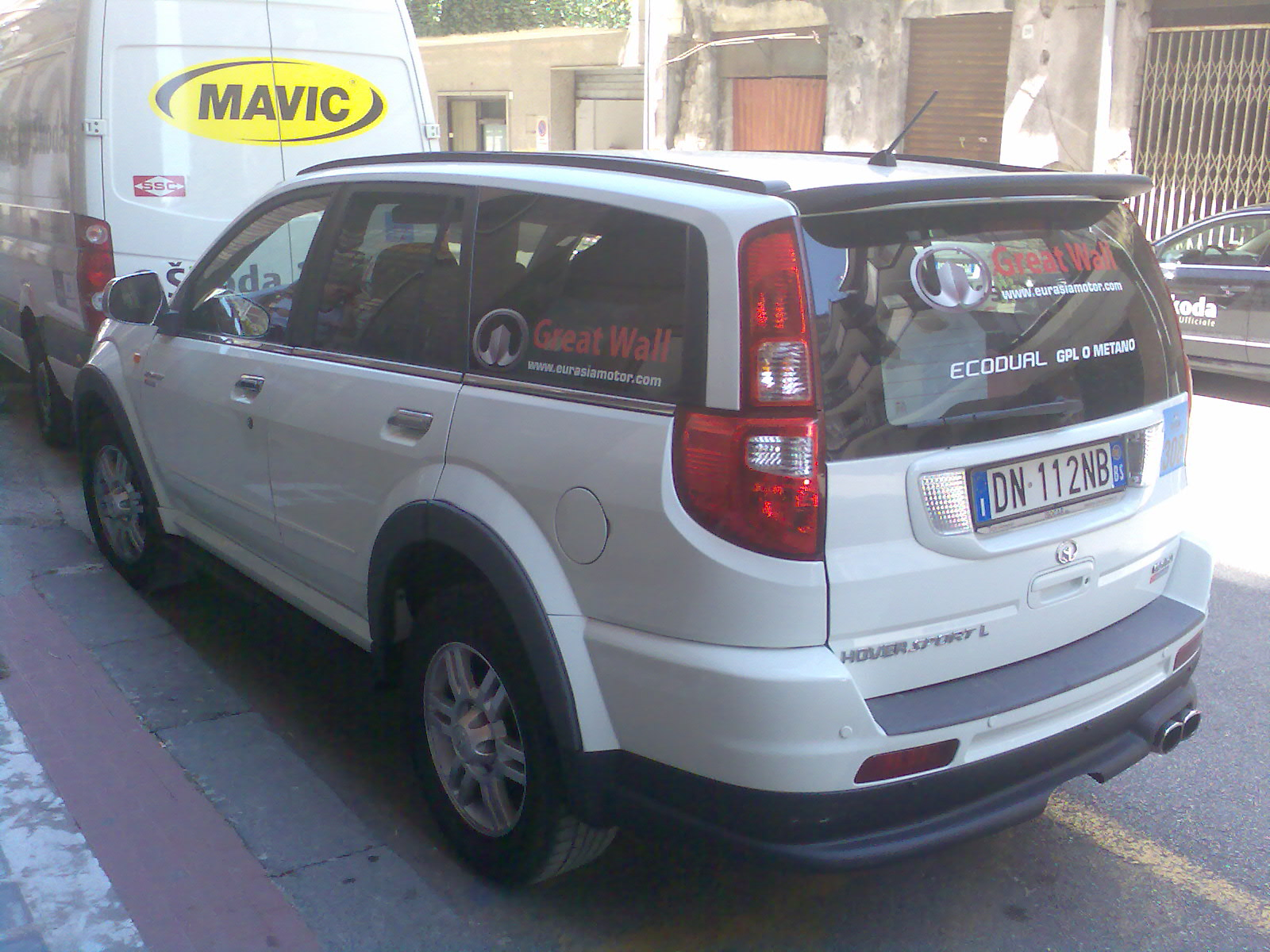 una Hover fotografata ad Avellino durante il giro d'Italia 2009